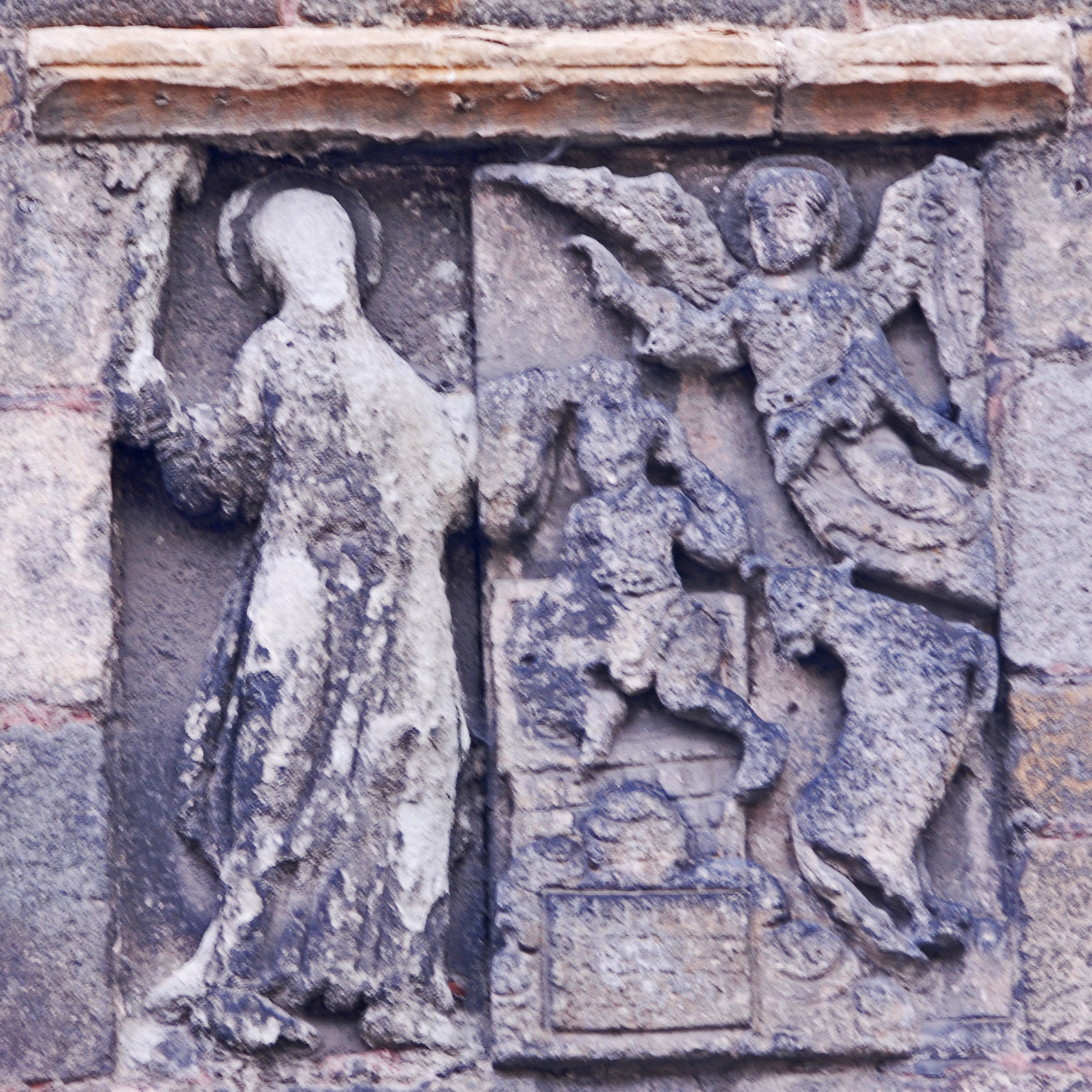 Nördl.Querhausgiebel, Relief, Abraham opfert Isaak